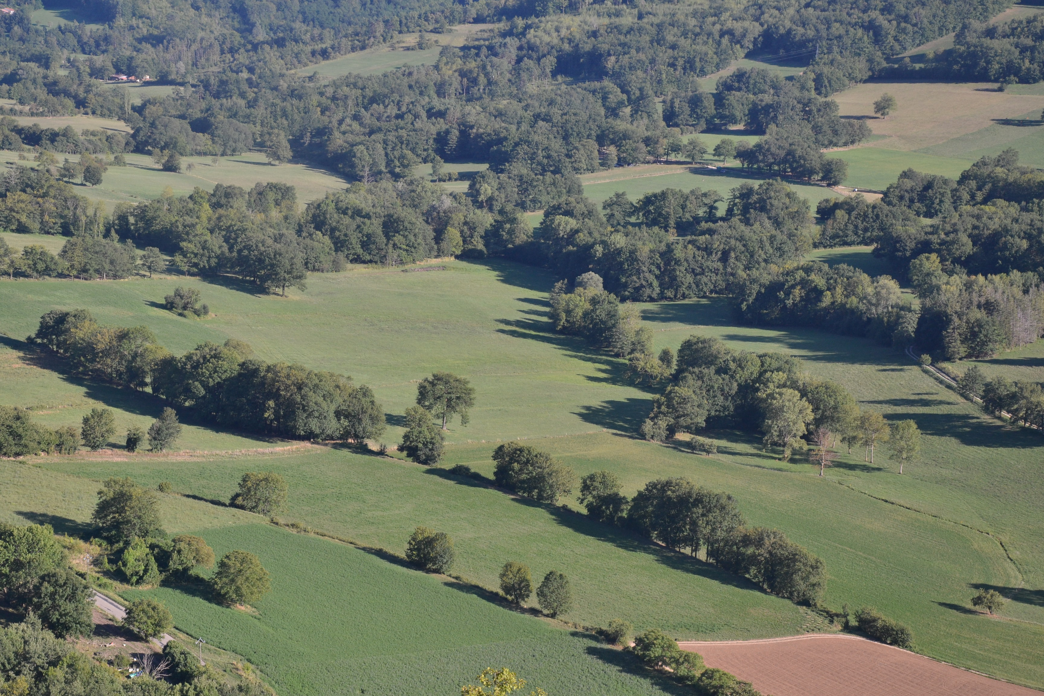 Paysage bocager de la vallée de Lesponne (Ariège, France).